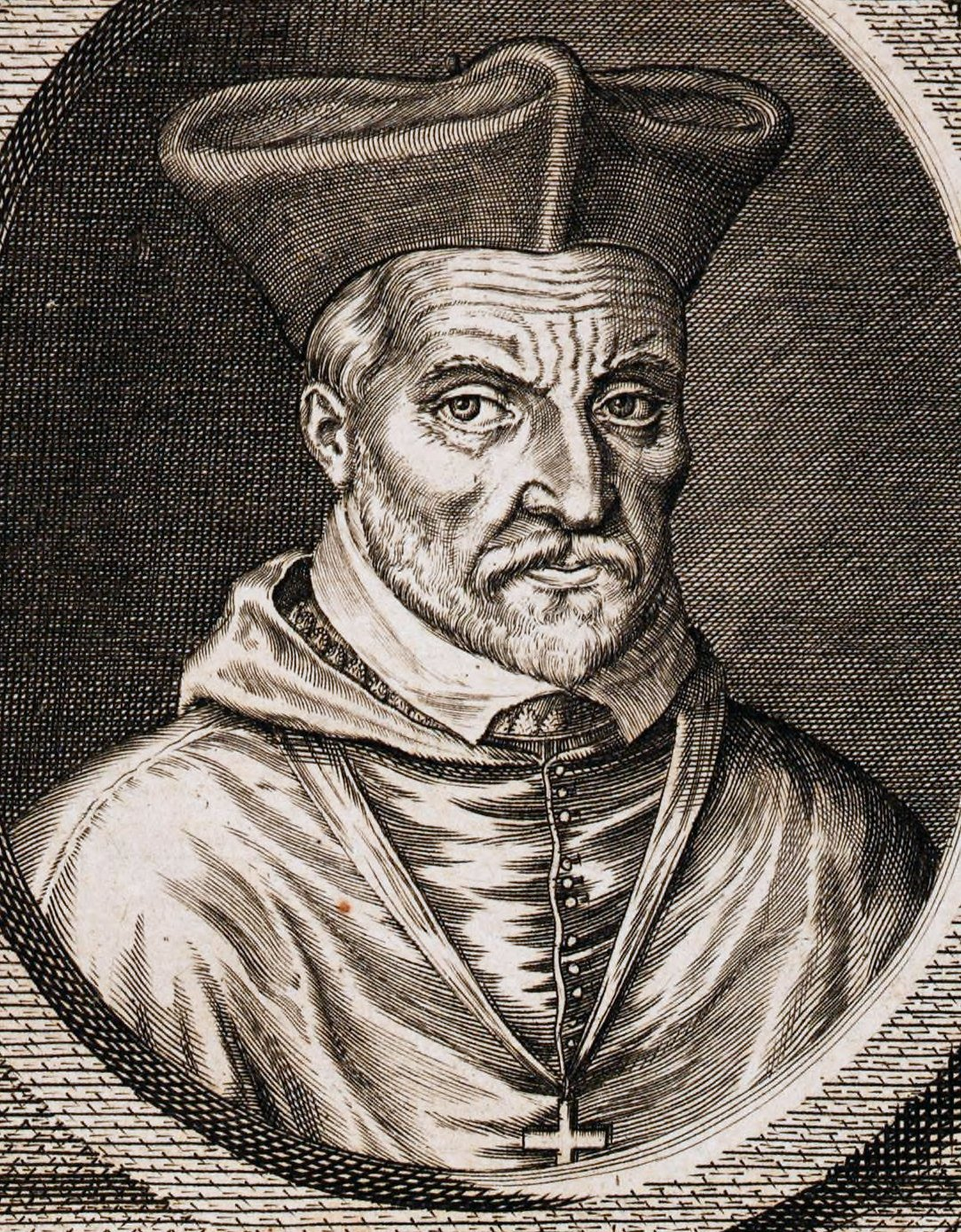 Jacques Amyot abbaye Saint-Corneille Picardie